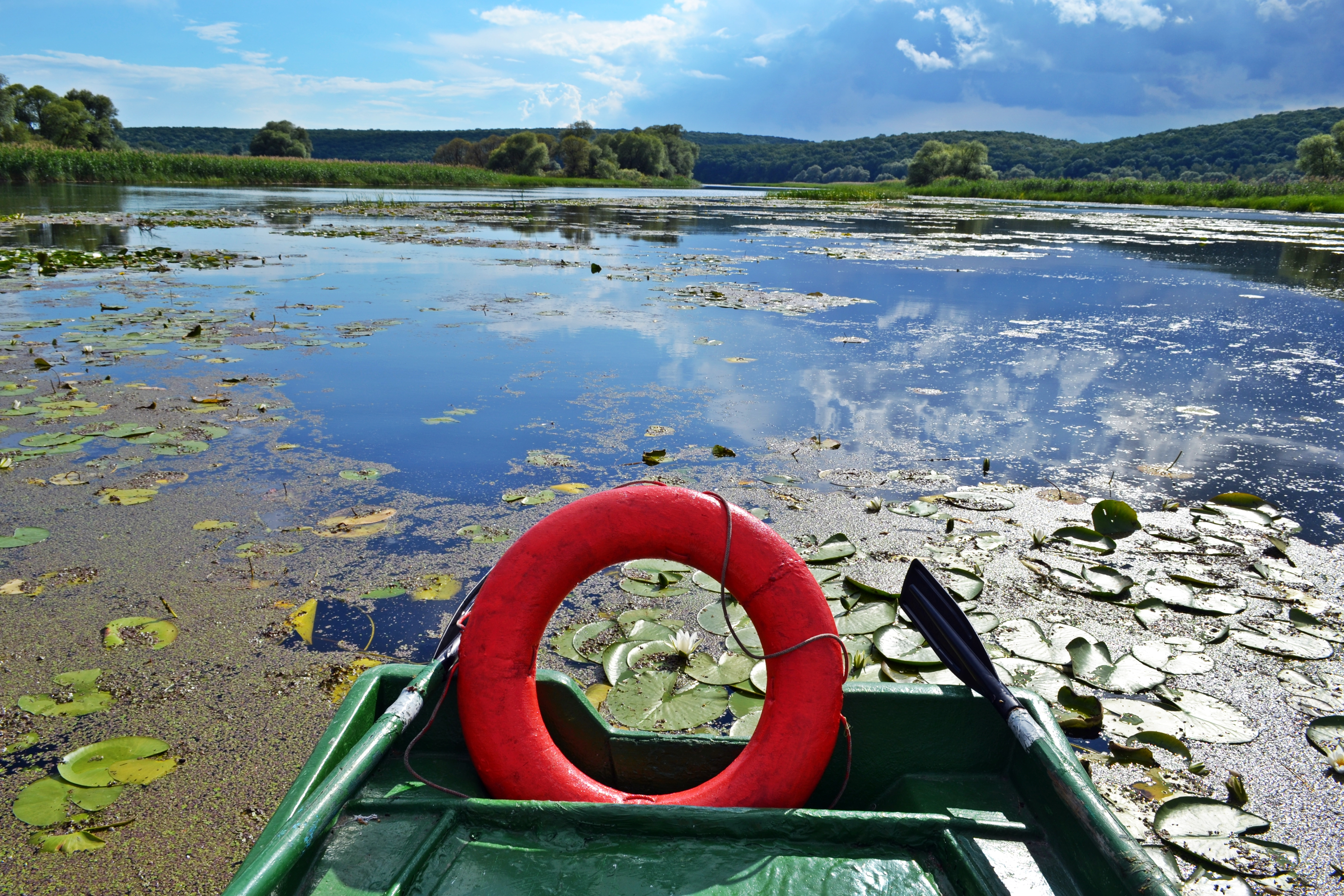 «Мерчицький», Валківський район смт. Старий Мерчик